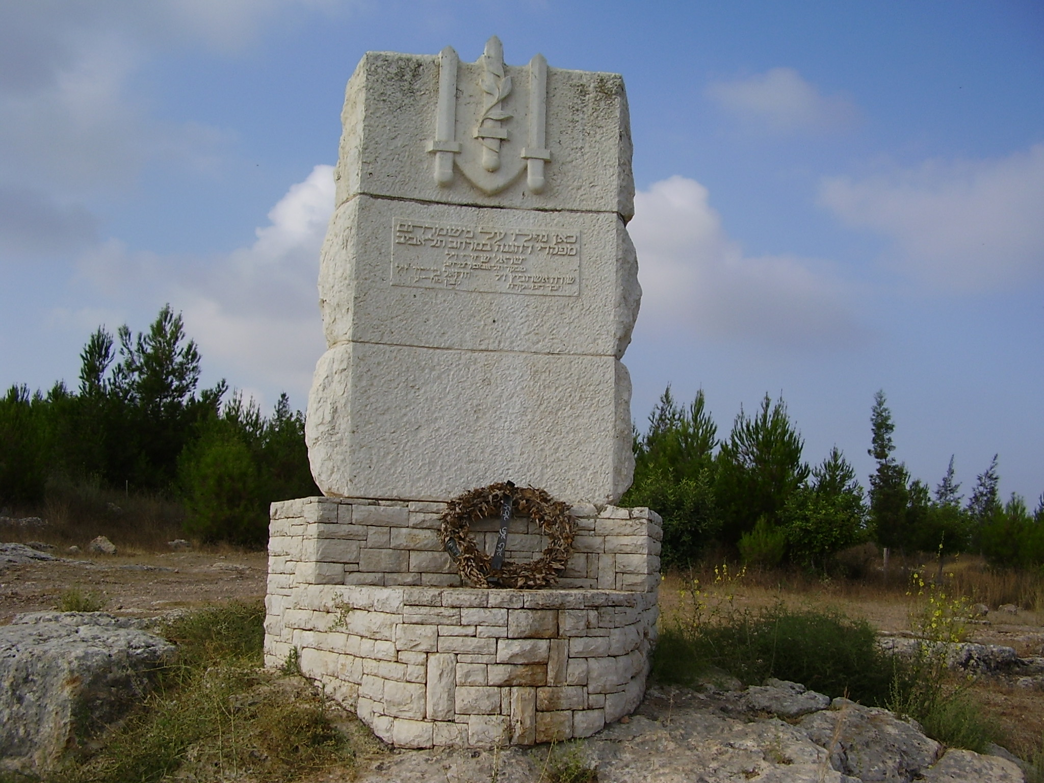 haganah memorial, israelאנדרטת מפקדי ההגנה ליד גמזו